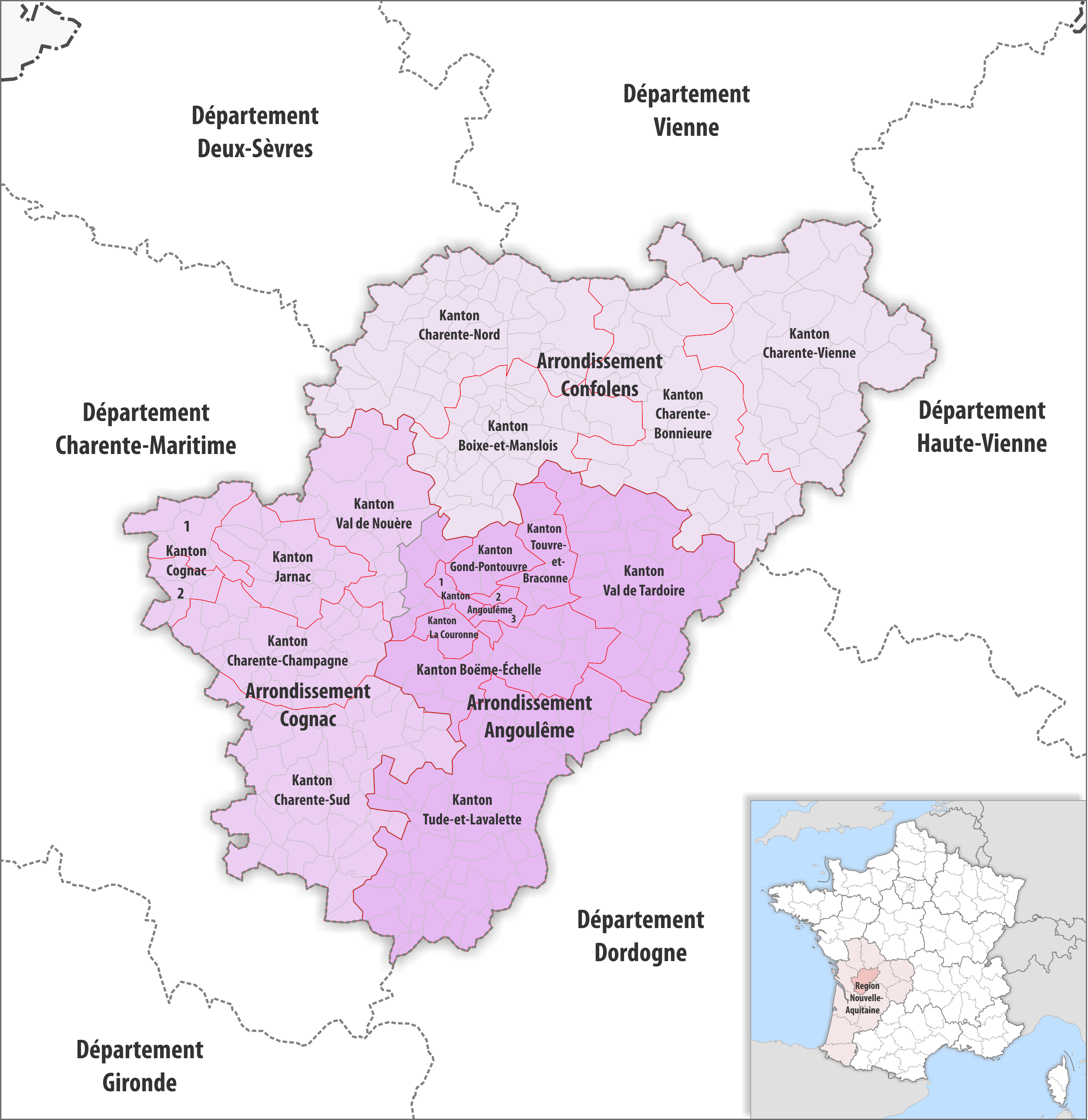 Gemeinden, Kantone und Arrondissemente im Departement Charente